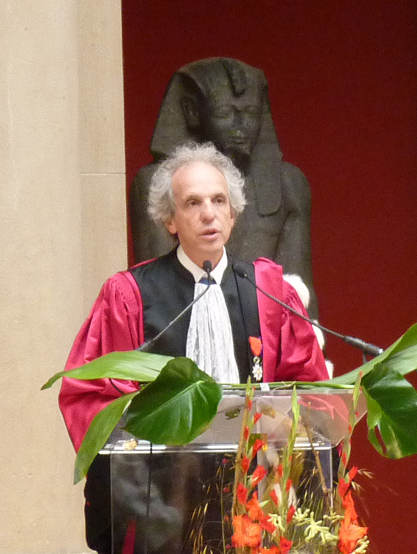 Allocution d'Alain Beretz, Président de l'Université de Strasbourg, lors d'une cérémonie au Palais Universitaire